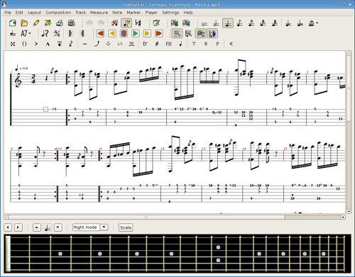 Aspecto del programa, bajo ubuntu linux.